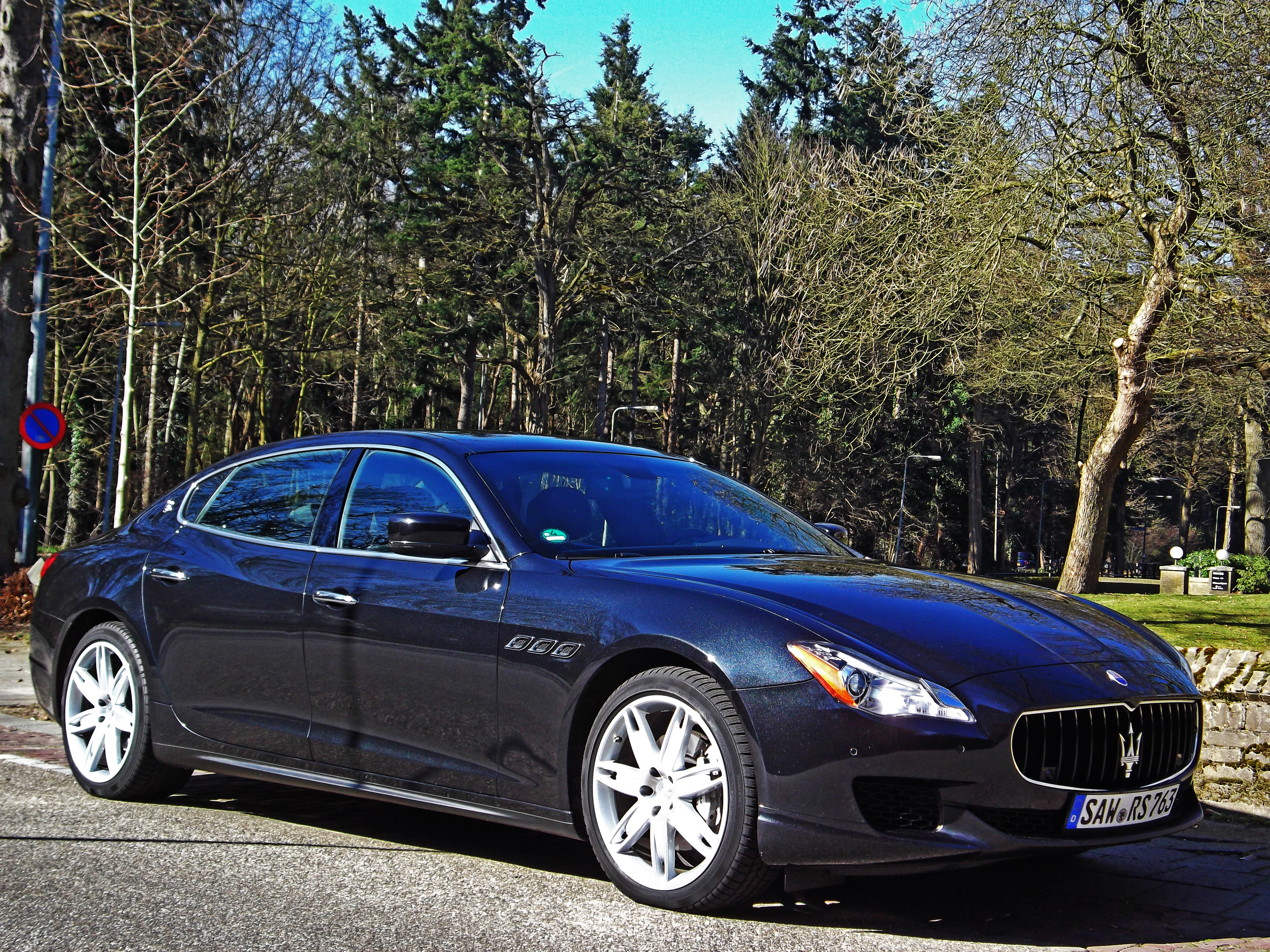 German license plate.